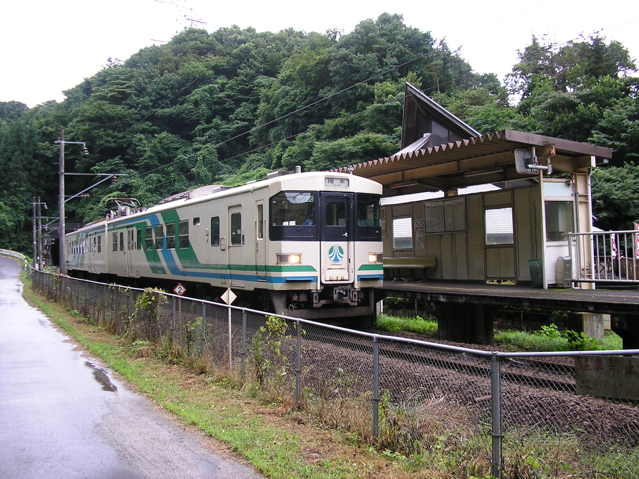 2006年8月投稿者撮影。あぶくま駅